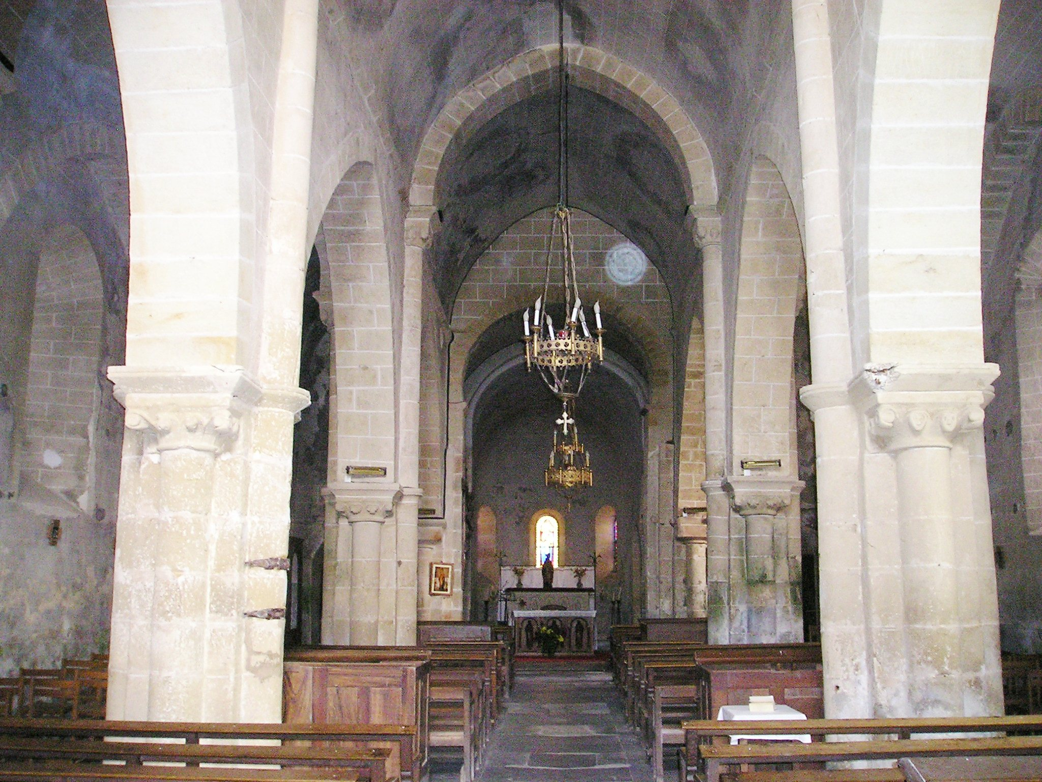 Deux-Chaises, Église St-Denis, innen.